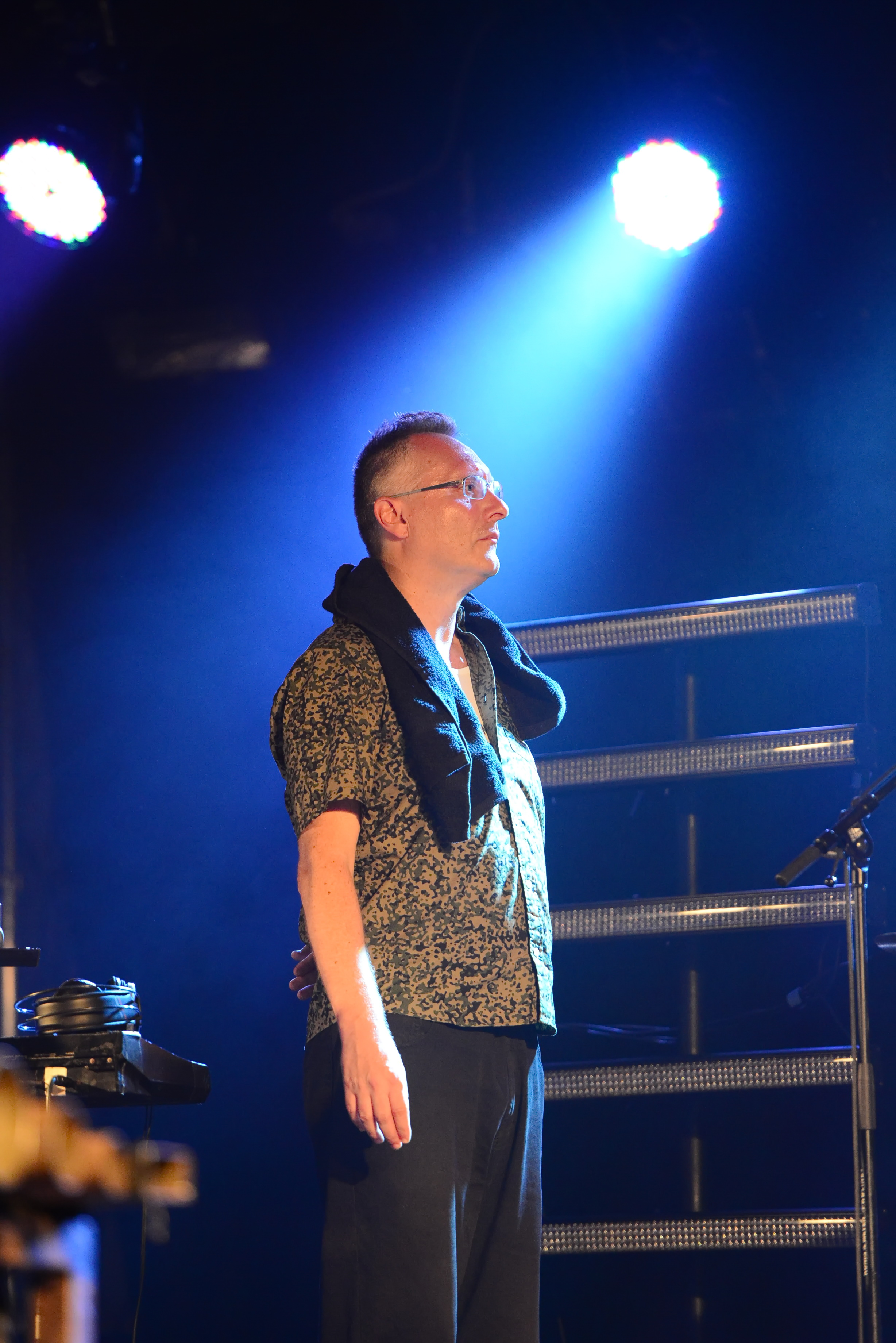 Die Krupps, Amphi festival 2014